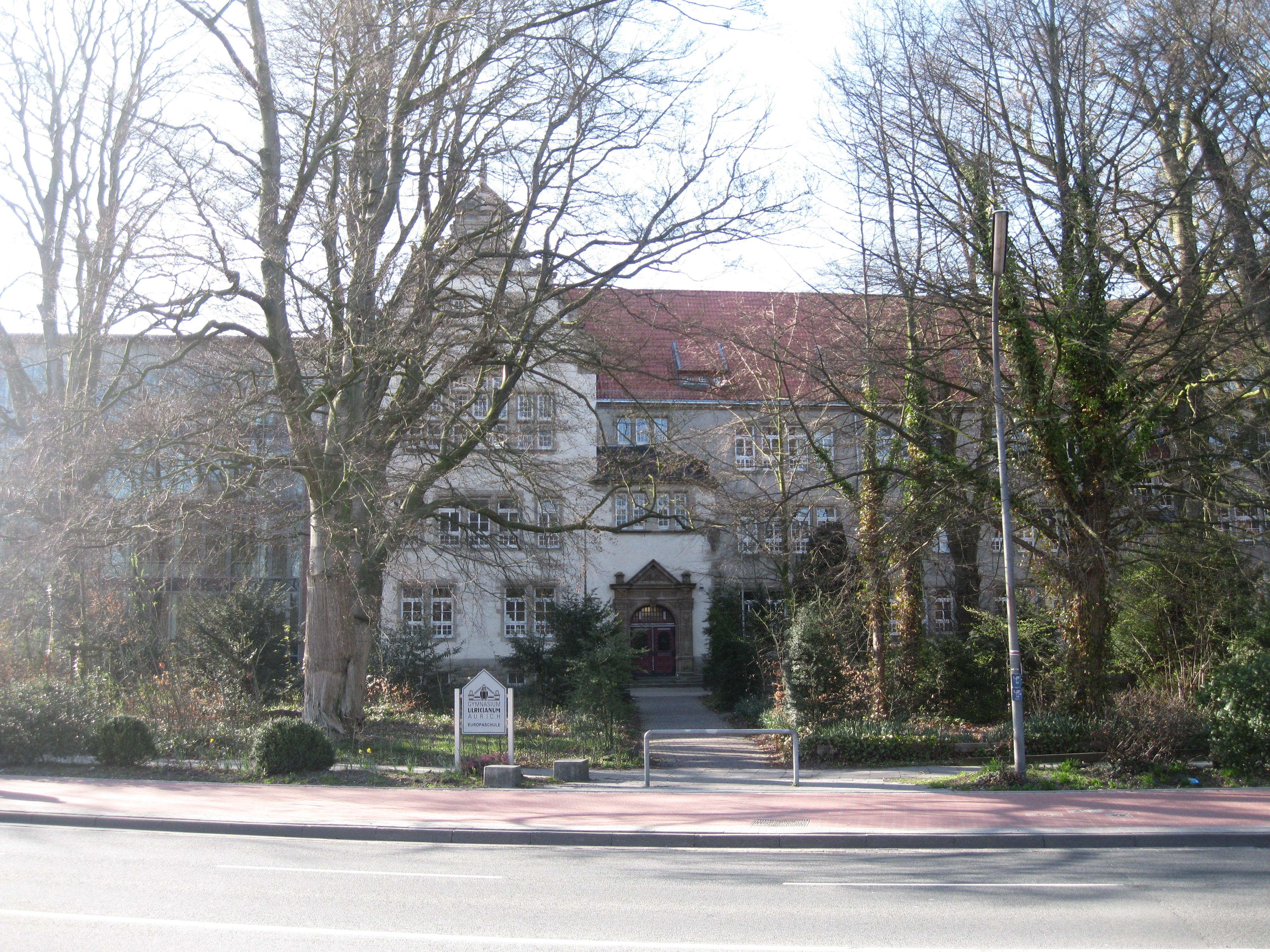 Gymnasium Ulricianum in Aurich - Altbau